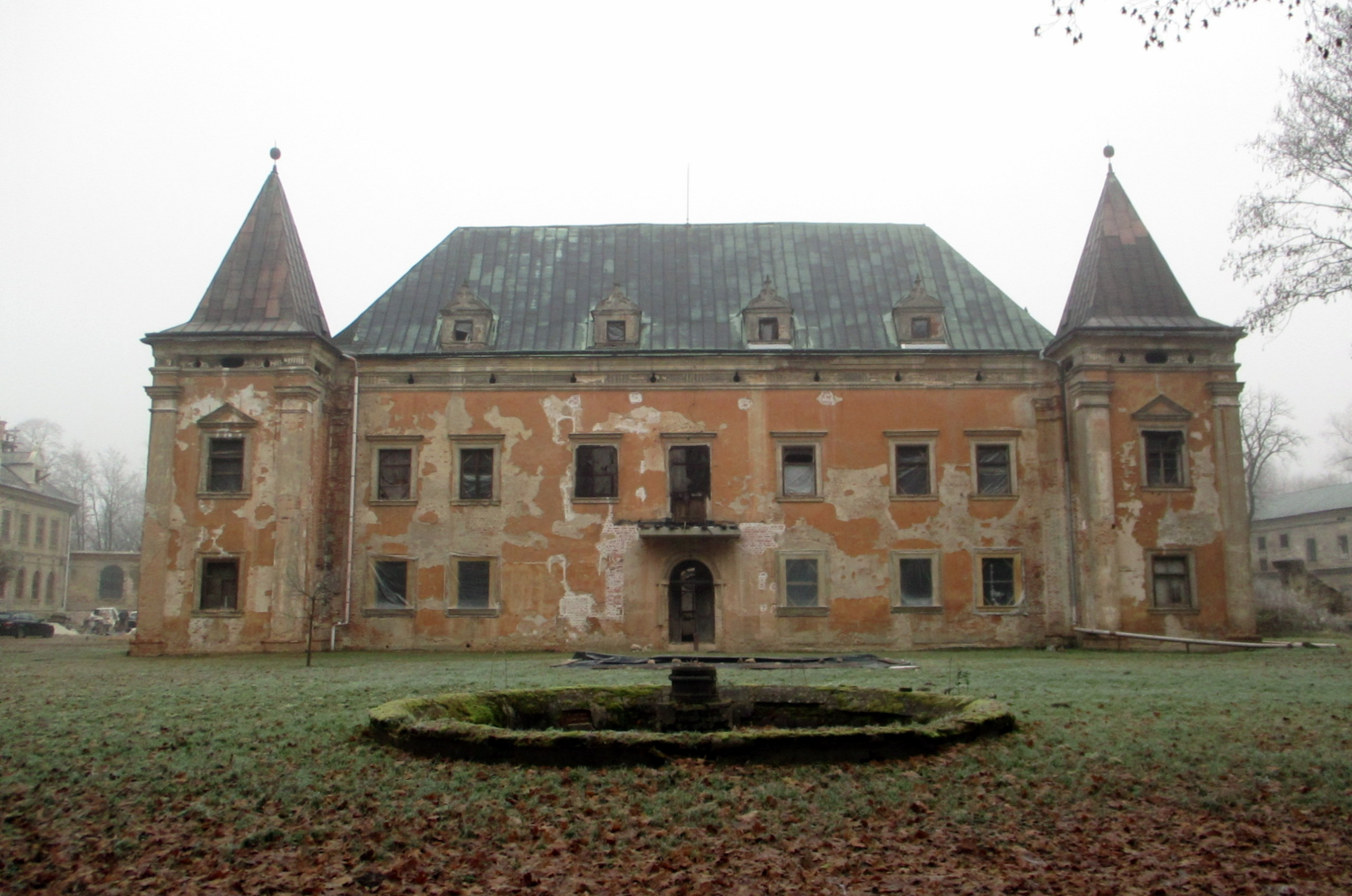 Pałac w Kruszynie, fasada od strony parku..